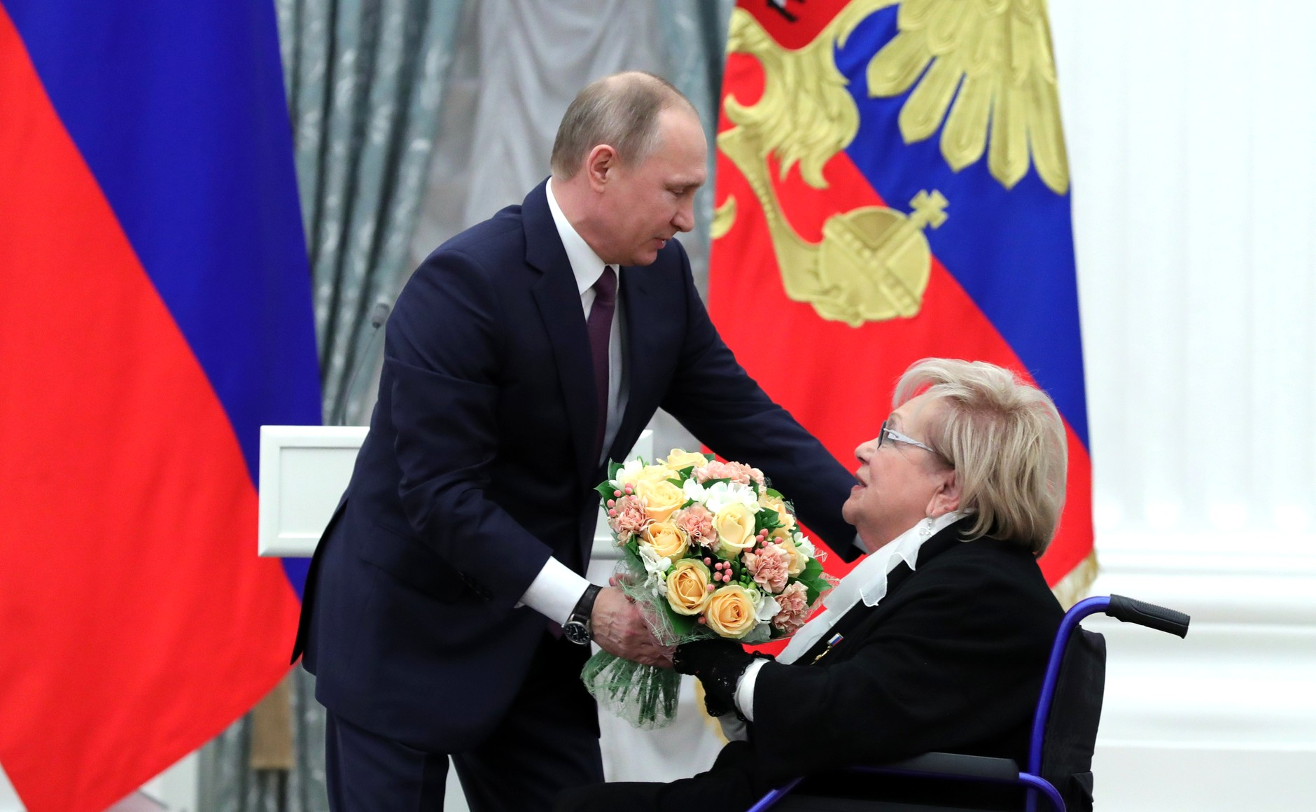 Вручение медалей «Герой Труда Российской Федерации». Звание Героя Труда присвоено художественному руководителю Московского театра «Современник» Галине Волчек.